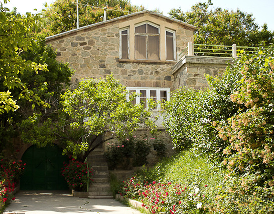 Պարույր Սևակի տուն-թանգարան